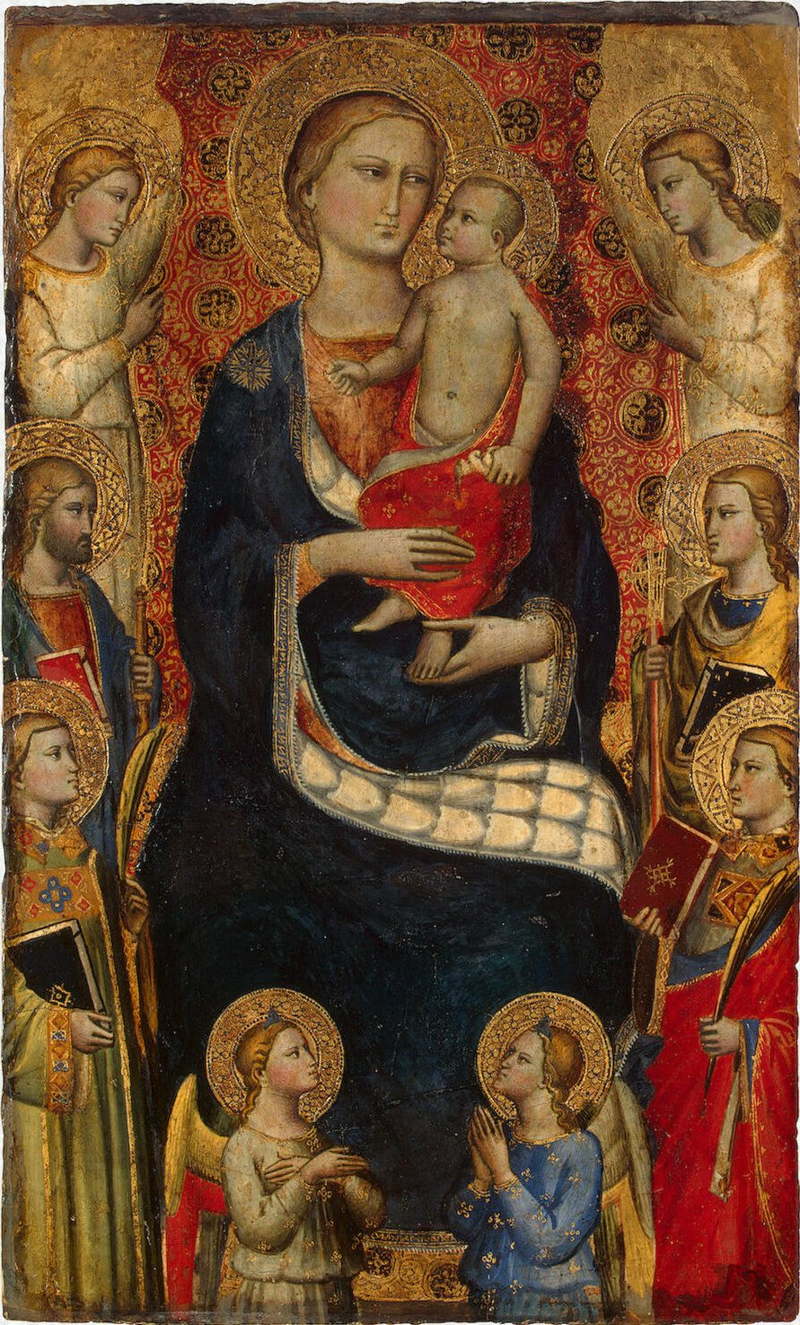 Мадонна с младенцем, четырьмя святыми и четырьмя ангелами